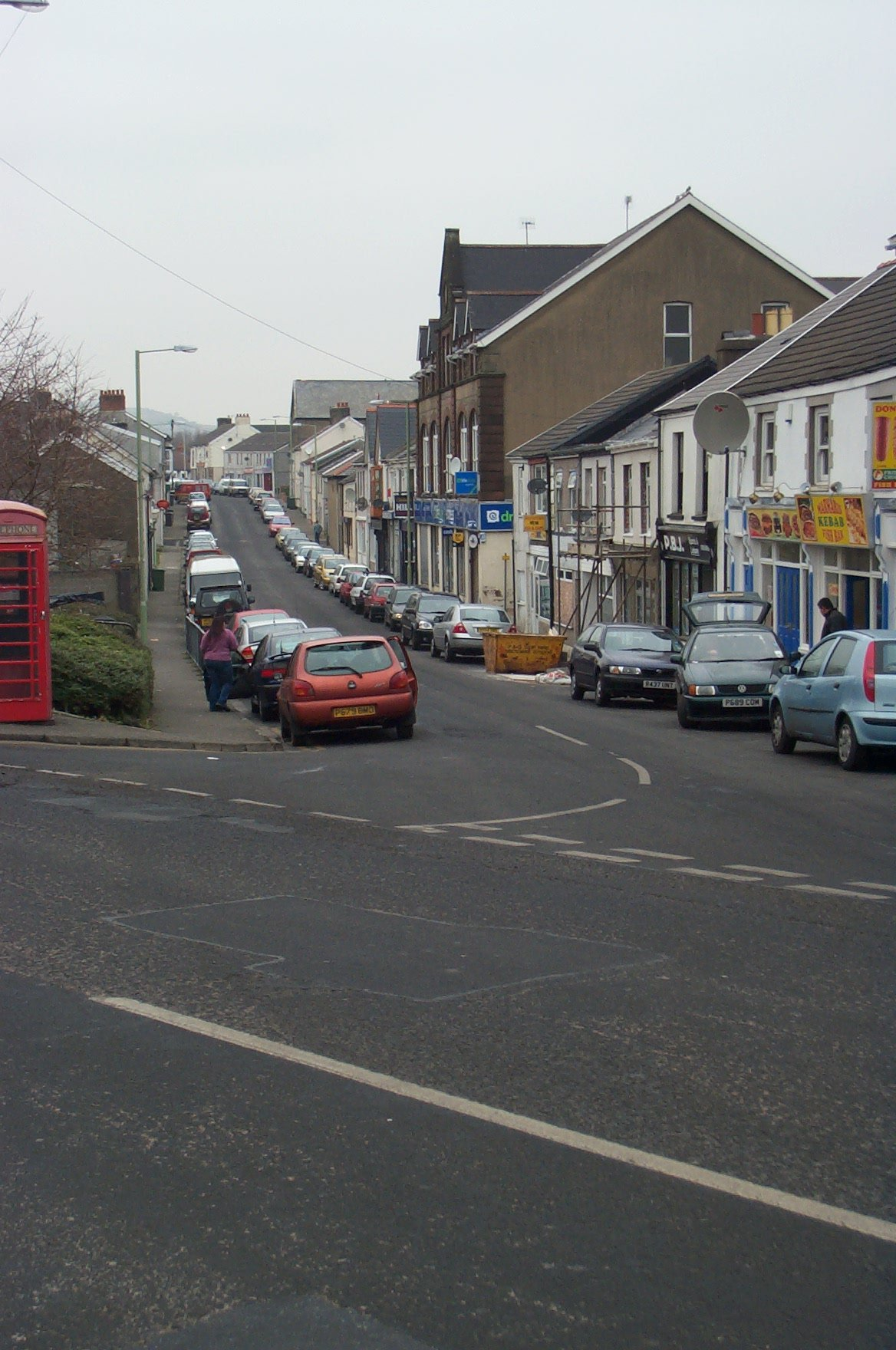 Lewis Street, Aberaman, Rhondda Cynon Taff Imaged donated by Aberdare Blog